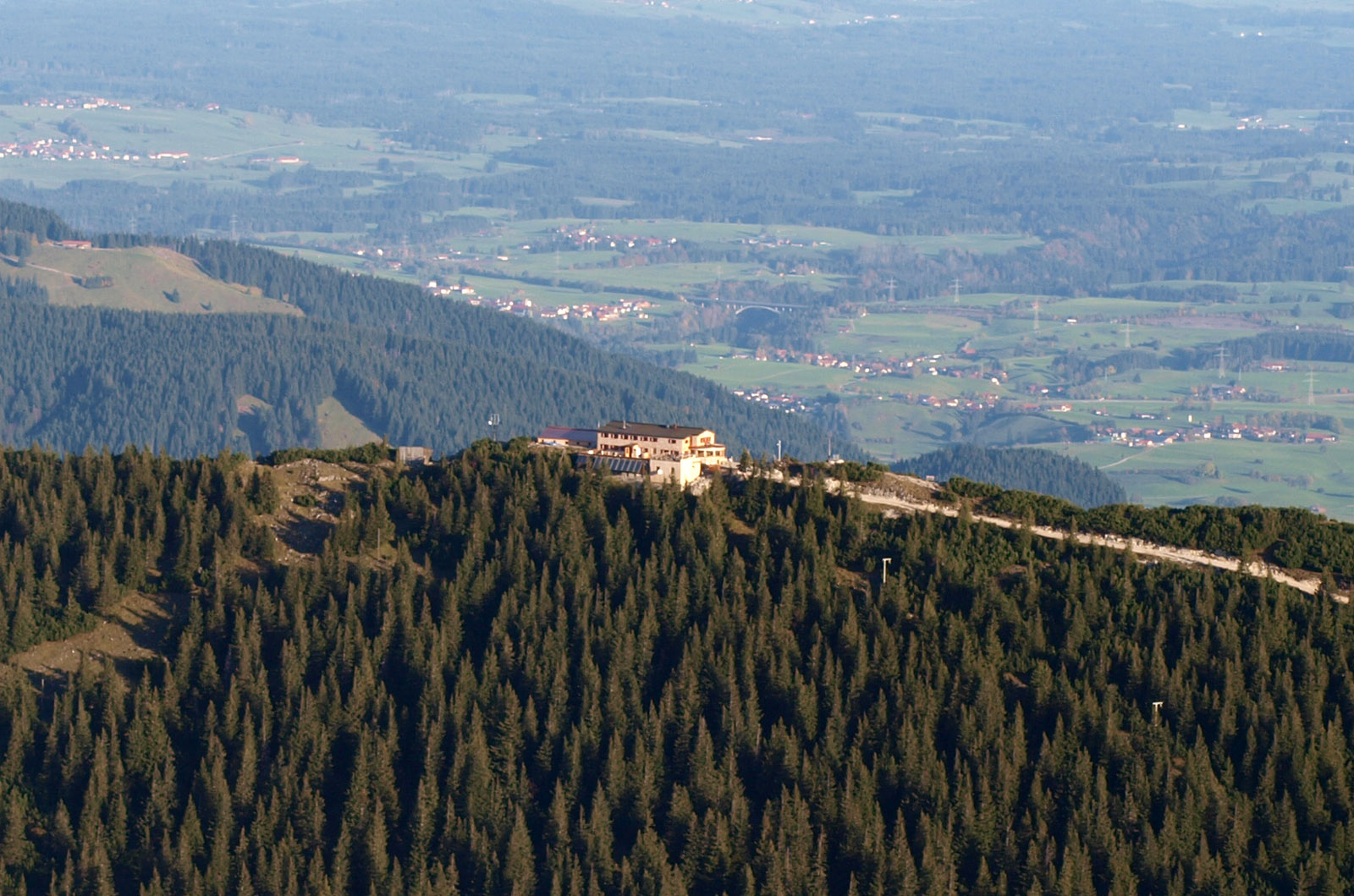 Die Ostlerhütte auf dem Breitenberg vom Aggenstein aus fotografiert